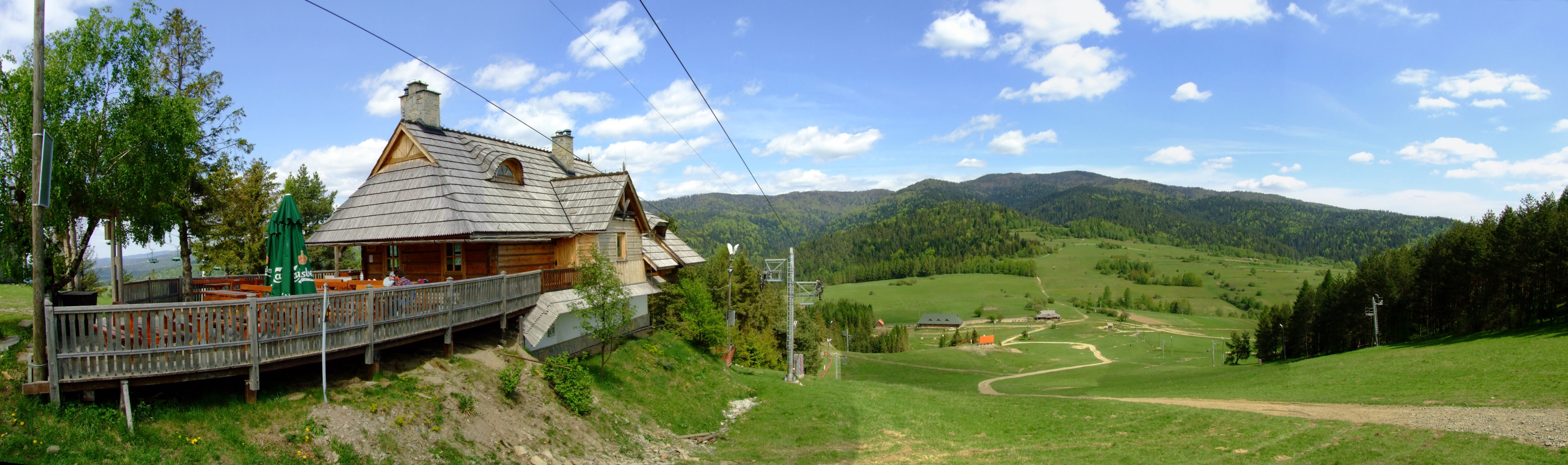 Panorama z Wdżaru na Gorce. Widoczne Pasmo Lubania